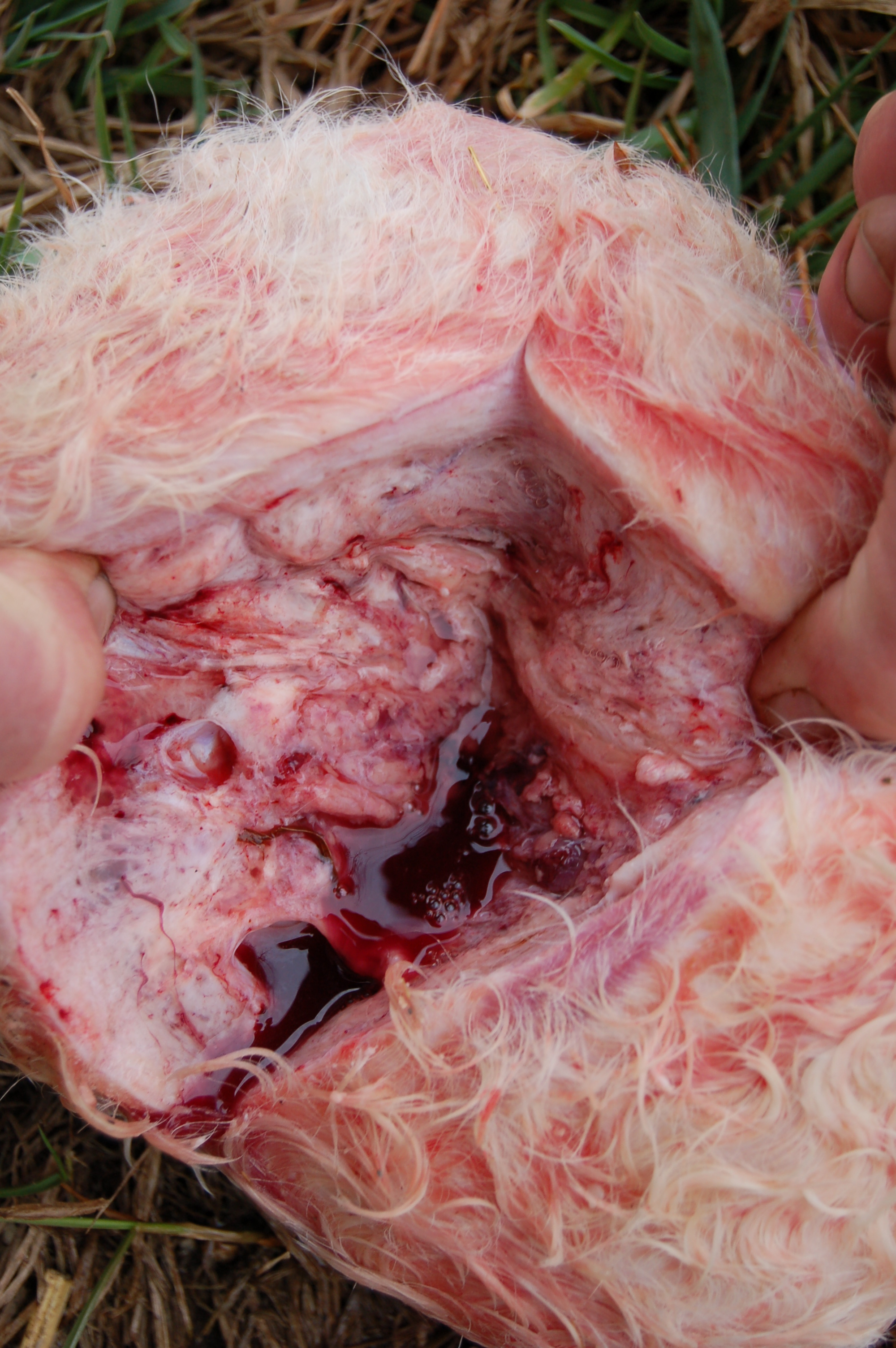 Zwillingsmissbildung bei Fleckviehkuh, augeschnitten